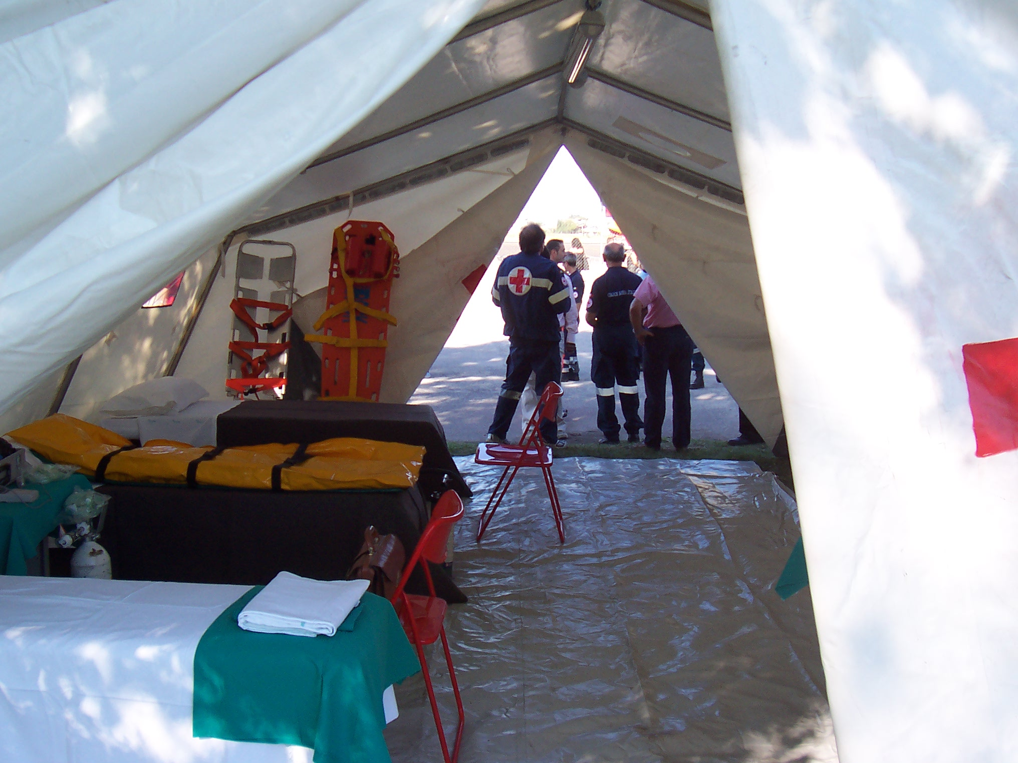 Posto Medico Avanzato - Croce Rossa italiana Comitato di Foligno